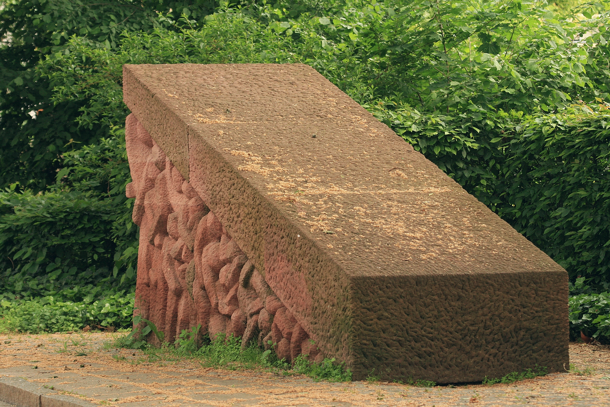 Porajmos-Denkmal Wiesbaden